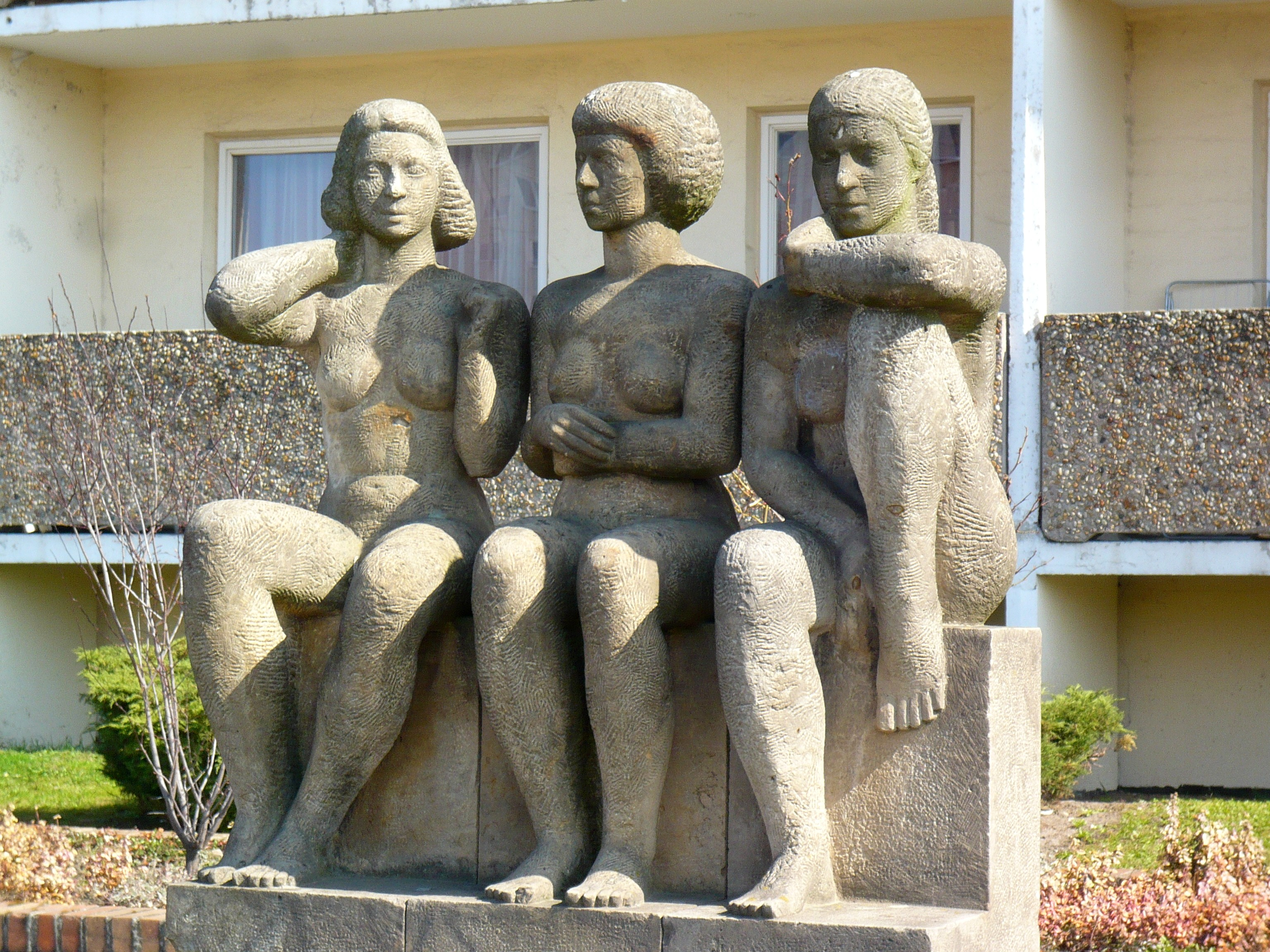 Ortsteil Marzahn: Allee der Kosmonauten: Skulptur vor dem Haus Nr. 194